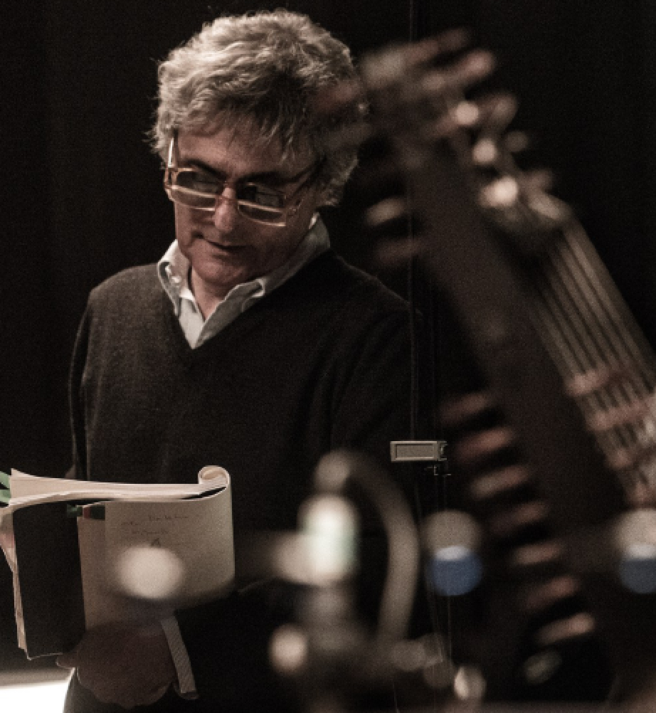 sul set delle riprese del film concerto "Zoroastro. Io, Giacomo Casanova" Teatro Galli di Rimini